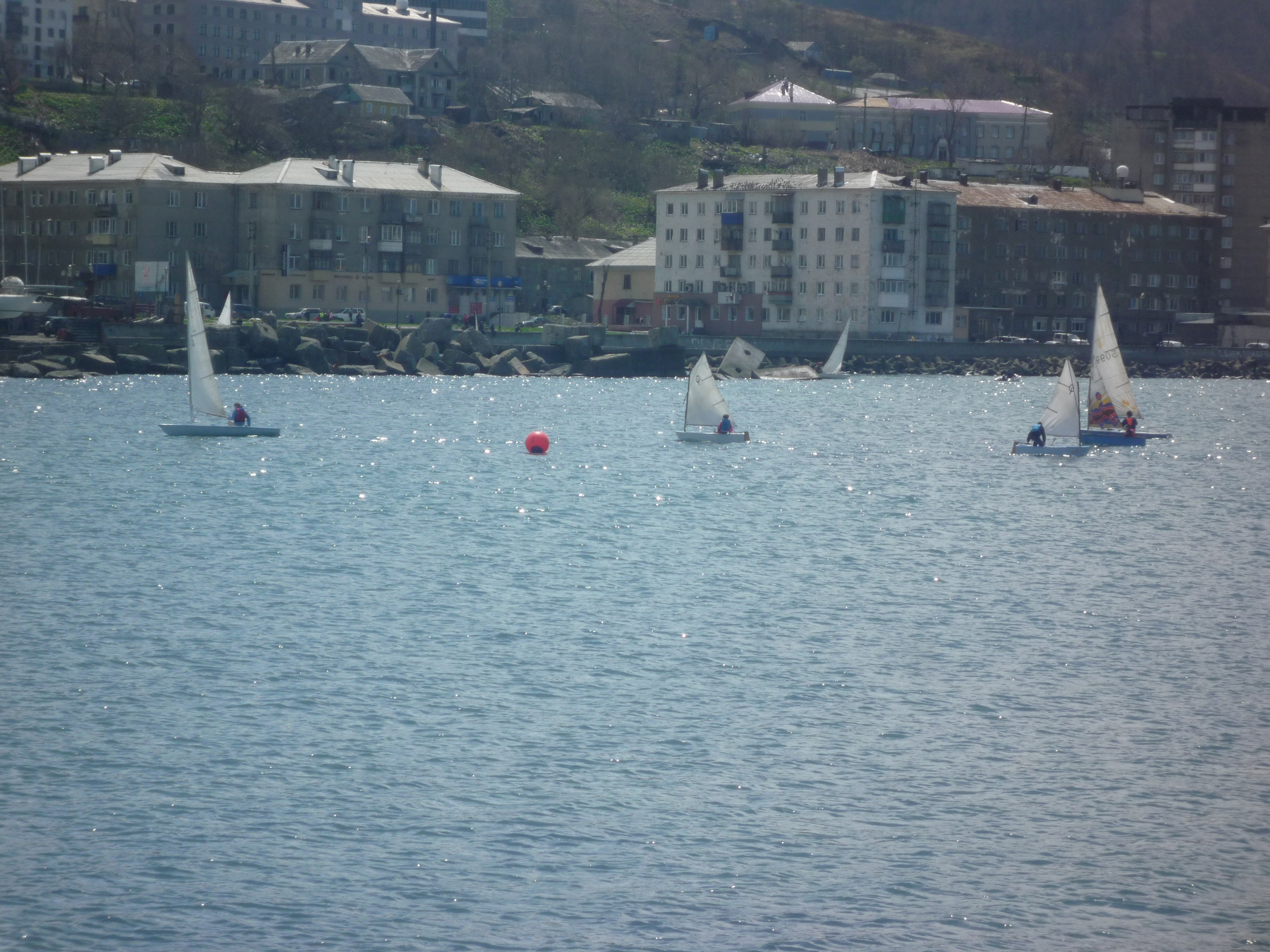 Катания на яхтах (Холмск)